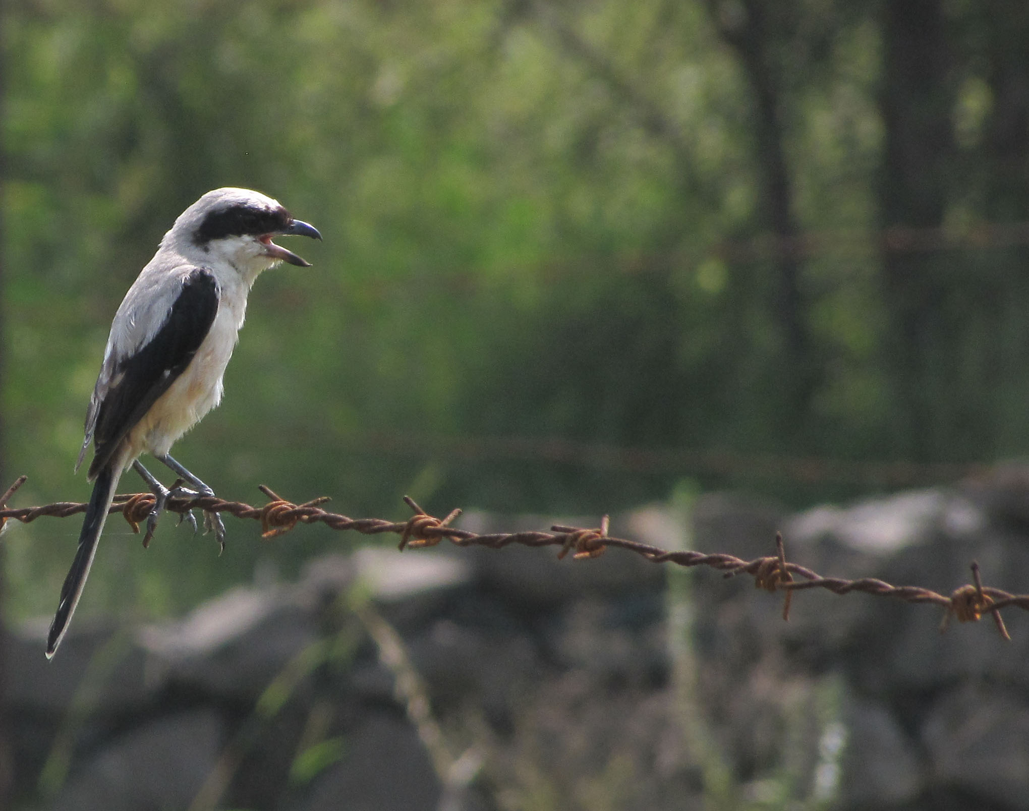 Taken near Pune.